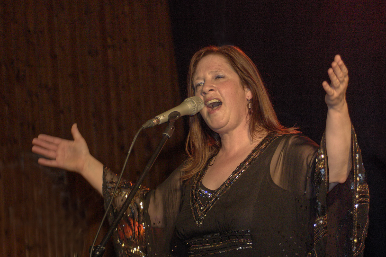 Kathy Kelly (* 6. März 1963 in Leominster, Massachusetts/USA als Kathleen Anne Kelly) ist die zweitälteste Tochter der Kelly Family, von der sie sich Ende 1999 trennte, um seit 2001 als Solomusikerin zu arbeiten.